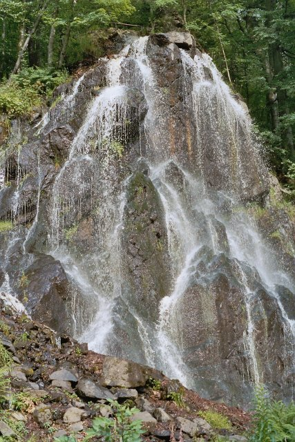 Künstlicher Wasserfall der Radau bei Bad Harzburg/Harz